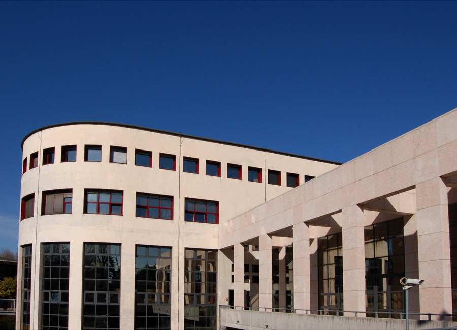 Esterno dell'Università di Verona, polo didattico Zanotto